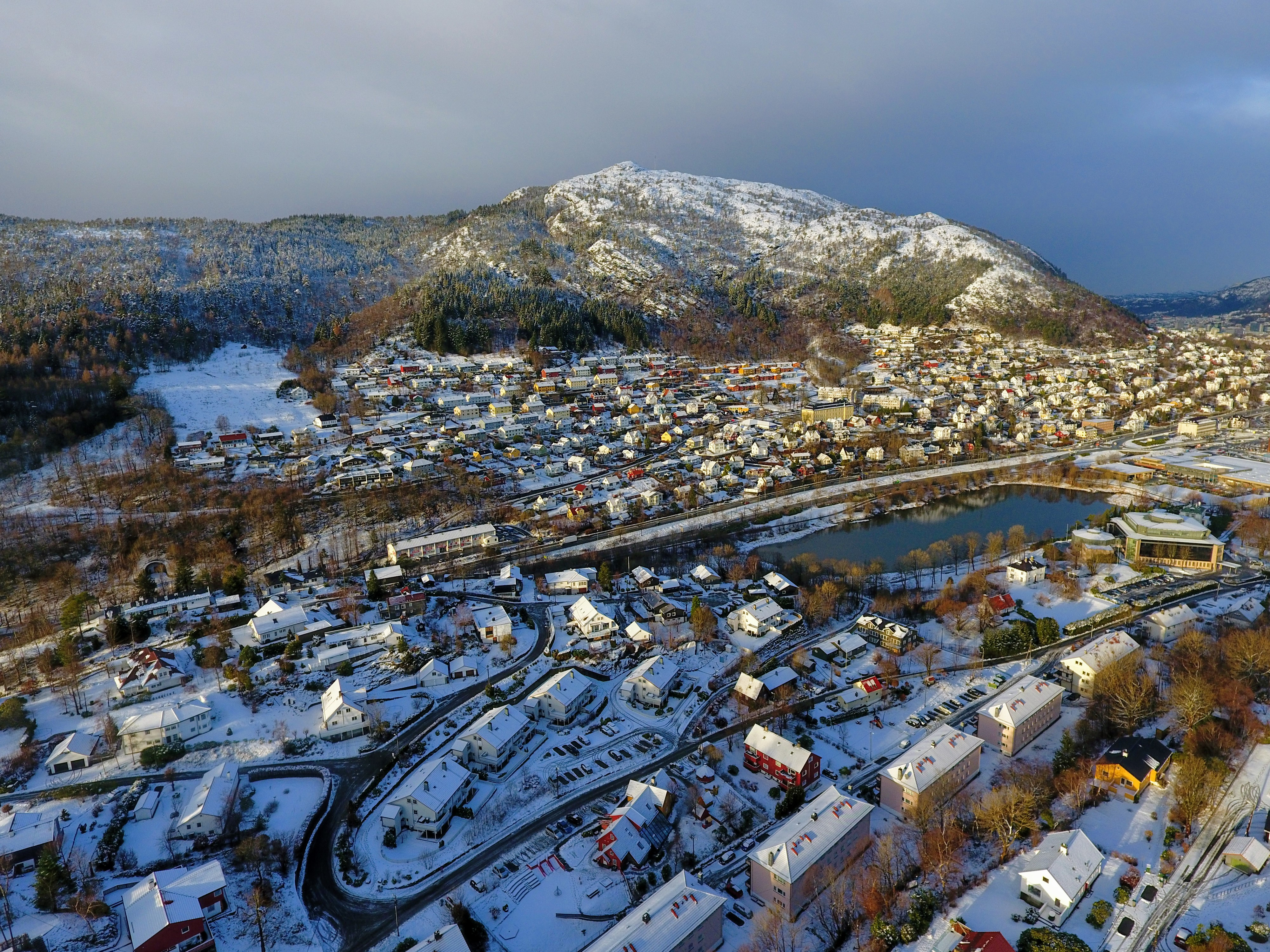 Utsikt over Minde og Løvstakksiden, fotografert fra Storetveit. Vinterdag i januar, formiddag